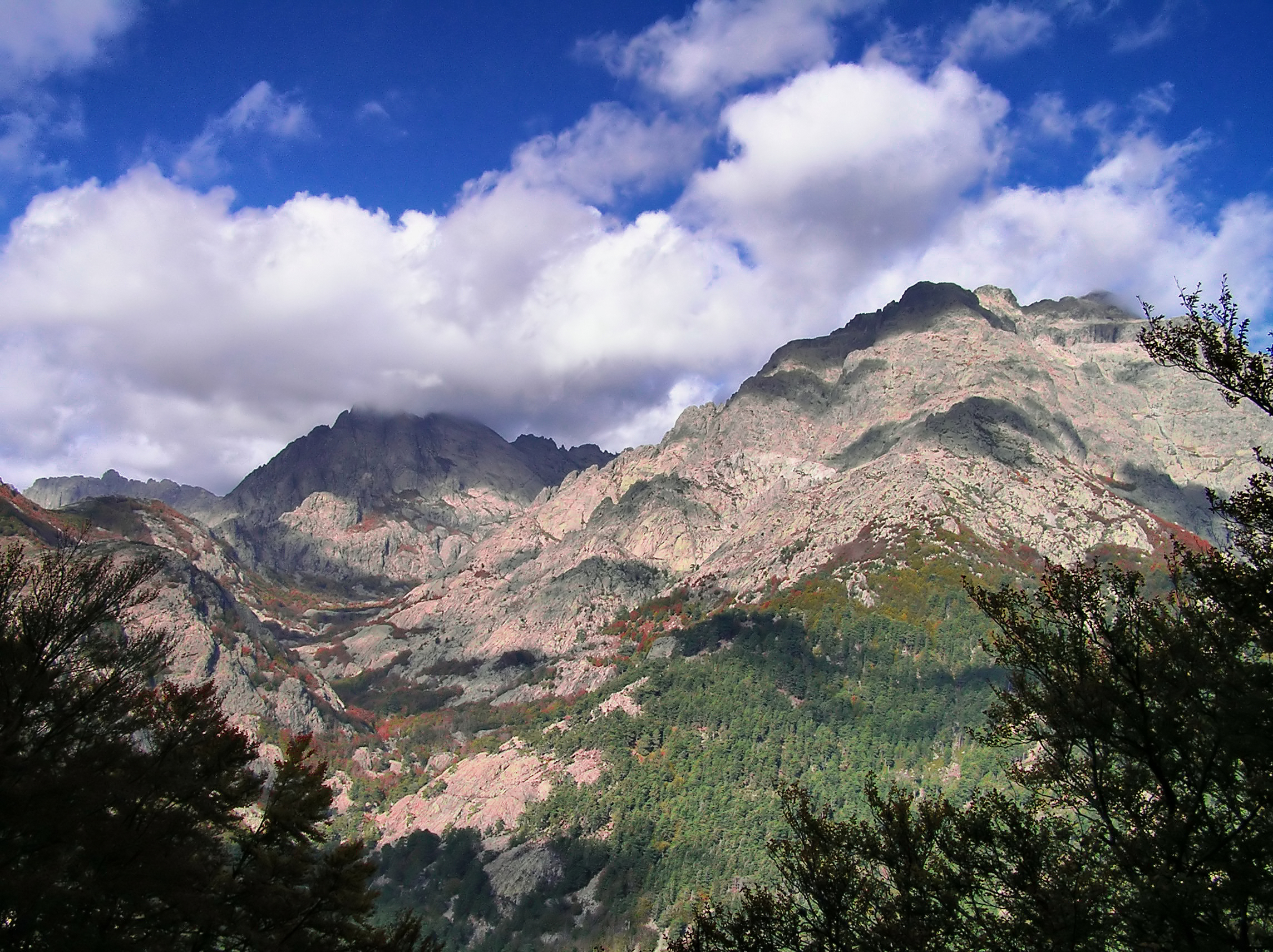 Le Monte d'Oru